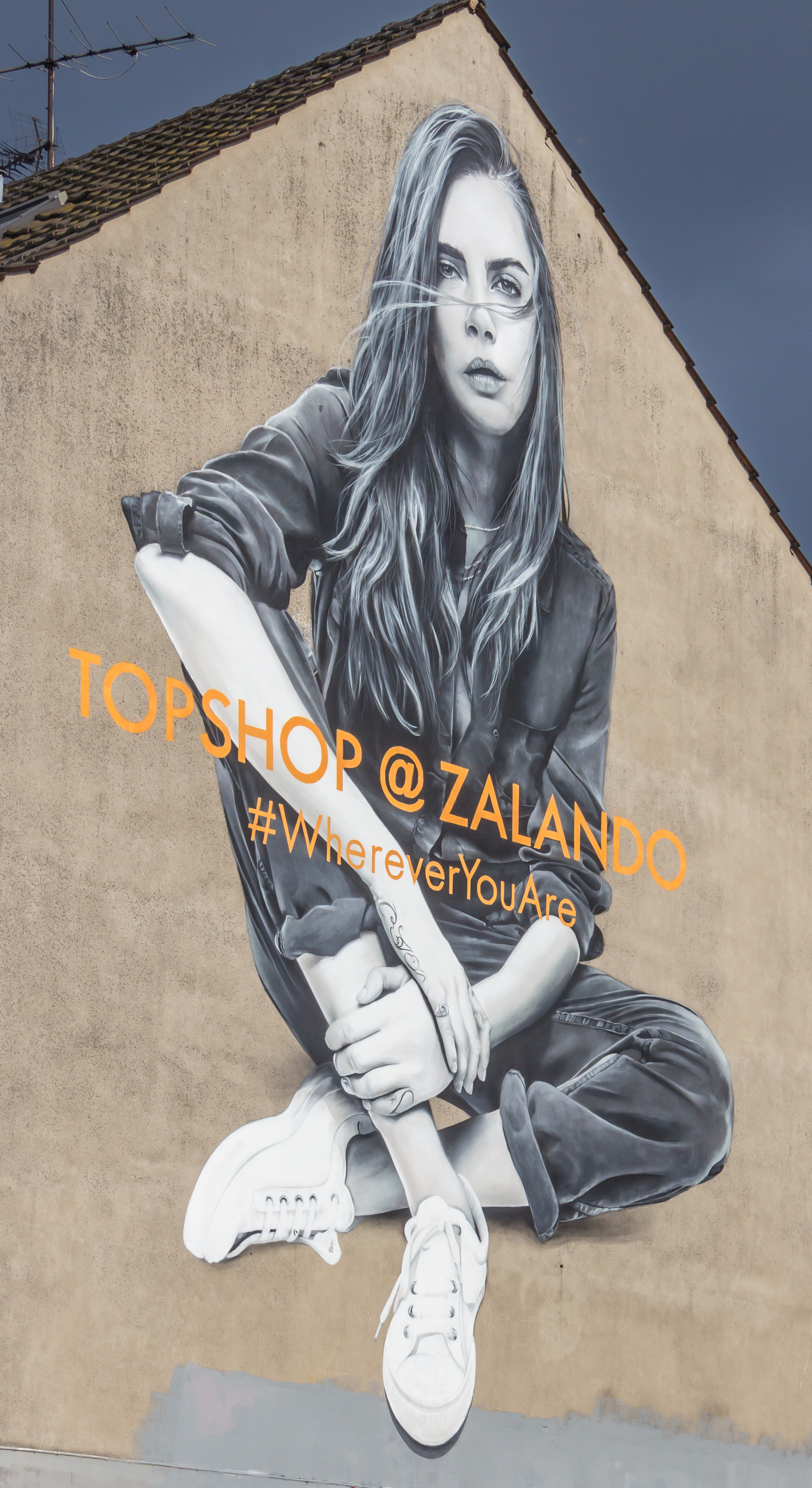 Hotel Ehrenfelder Zeitgeist mit Wandgemälde: Modemodell Cara Delevingne für „Topshop@Zalando #WhereeverYouAre“. Aktualisierung: Im August 2015 ist nur noch das Modemodell zu sehen. Die Werbung „Topshop@Zalando #WhereeverYouAre“ wurde übermalt.